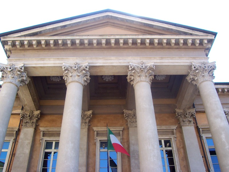 Bergamo - Liceo "Paolo Sarpi"